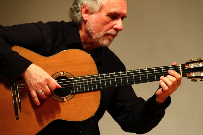 Jean-Marie RAYMOND en concert au Japon